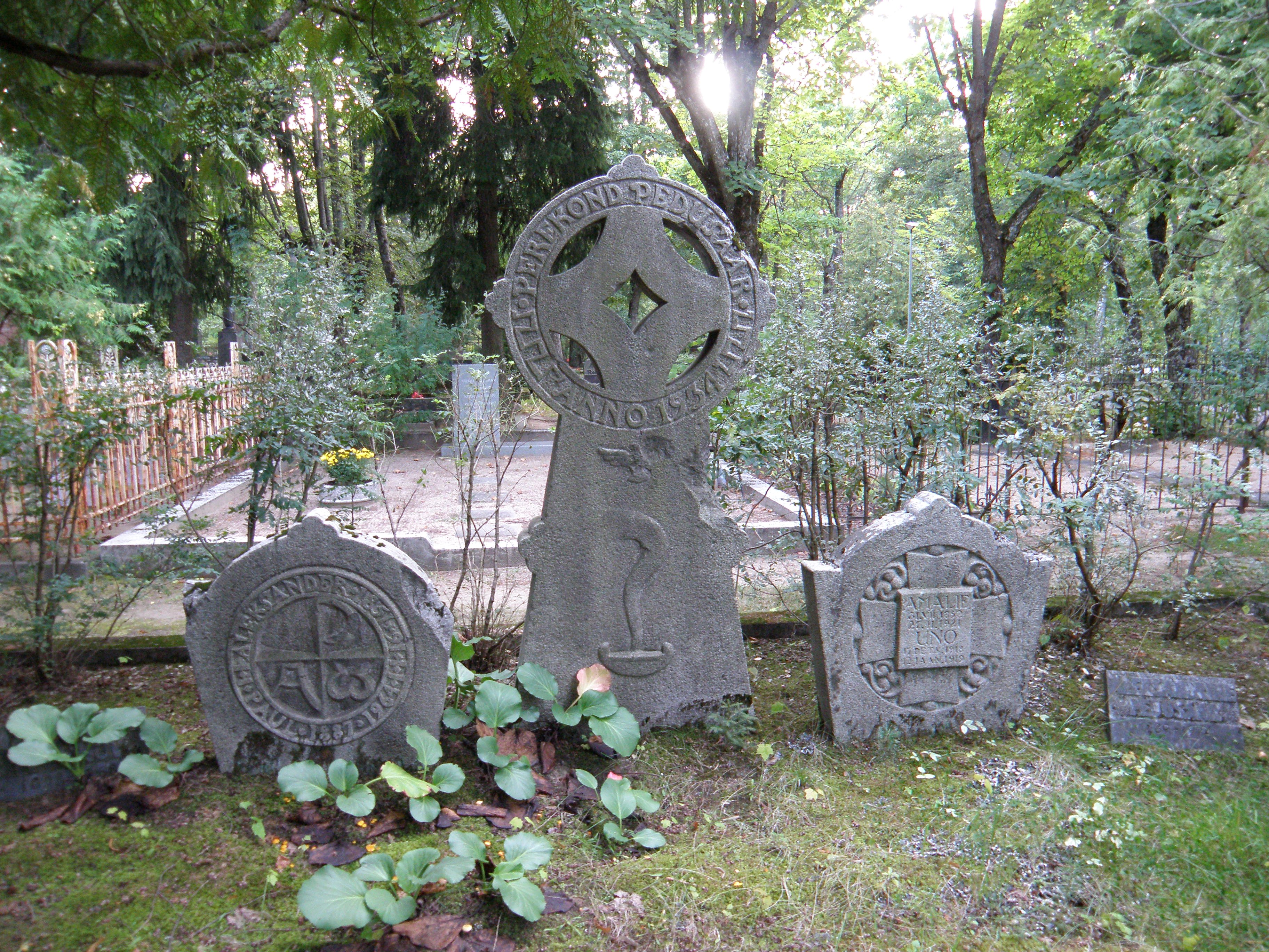 Perekond Pedusaare hauamonument